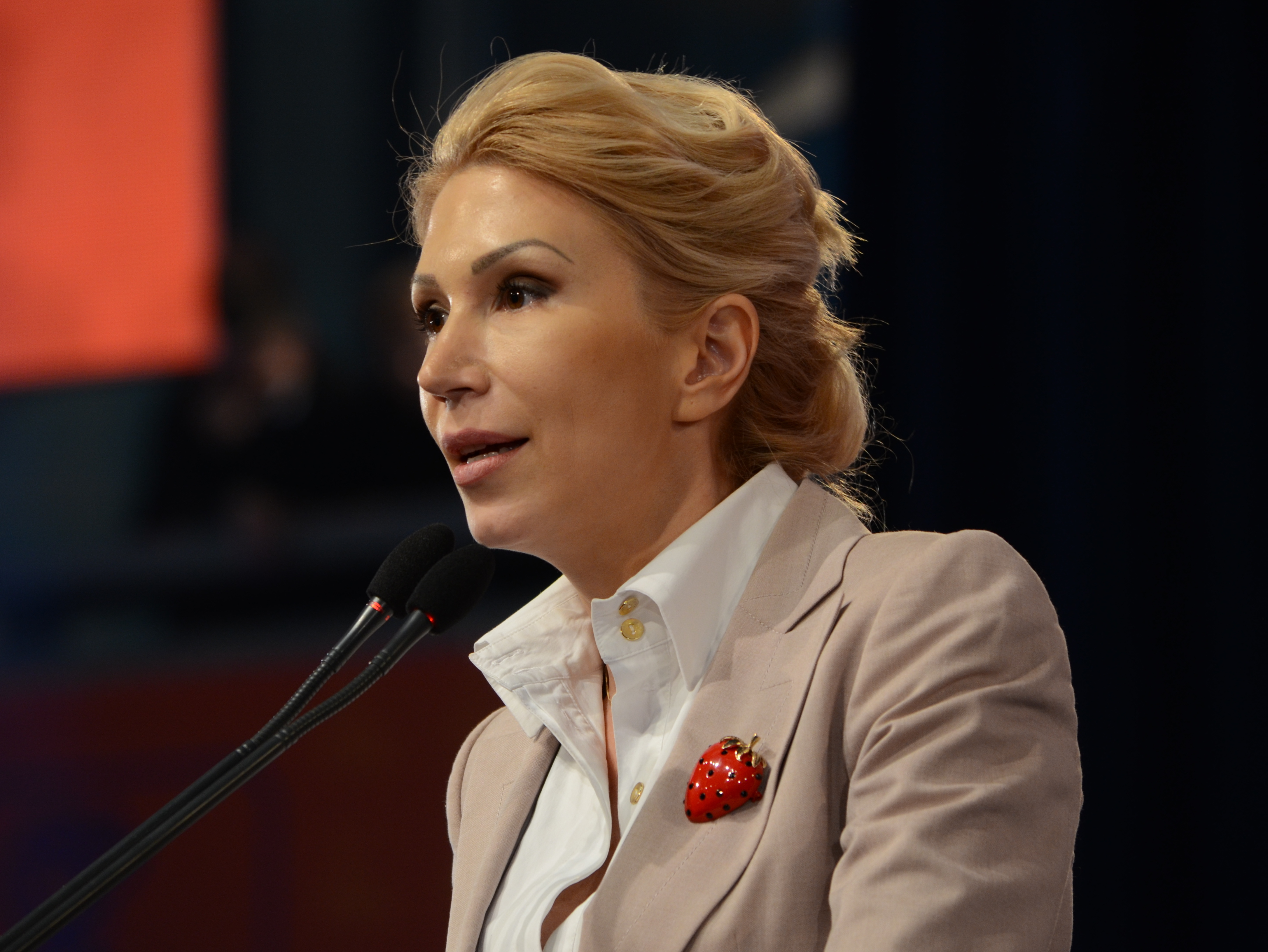 Raluca Turcan (la Convenția națională extraordinară a Partidului Democrat-Liberal, 23 martie 2013)